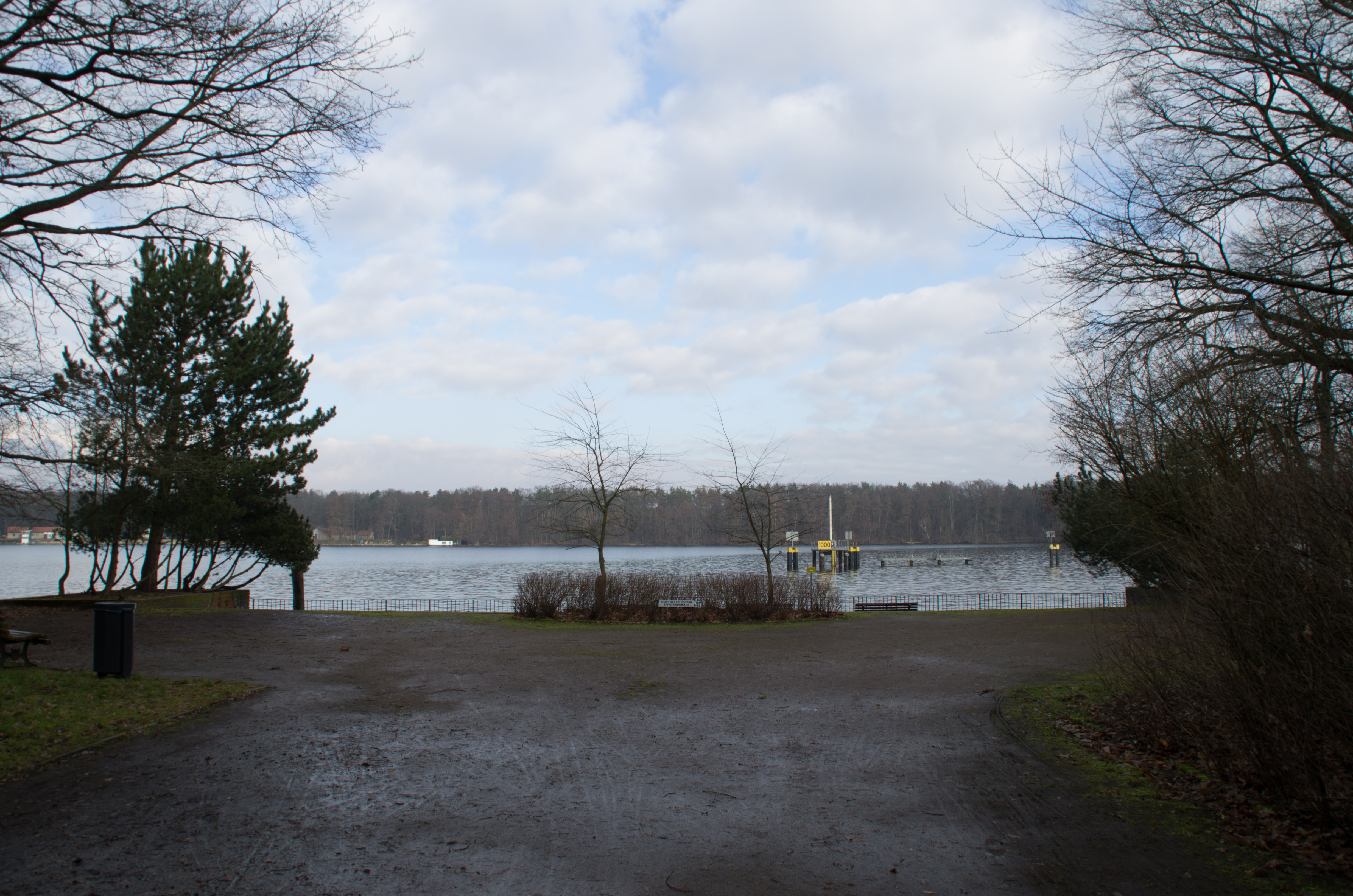 Berlin-Grünau. Von der Regattastraße geht ein Weg ab in Richtung Spree. Hier stand das Sportdenkmal. Heute ist der Platz leer.